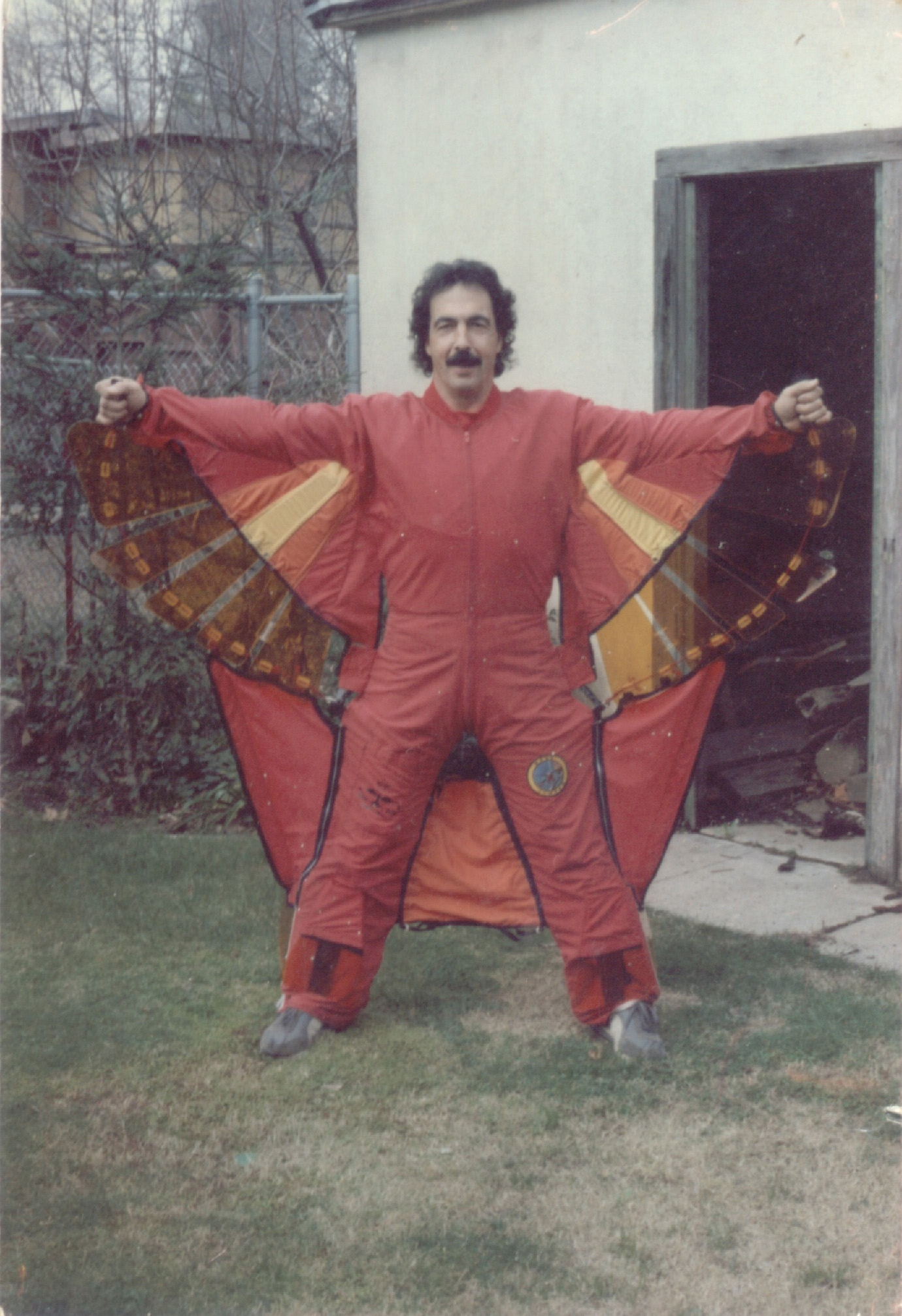 John Carta con tuta alare